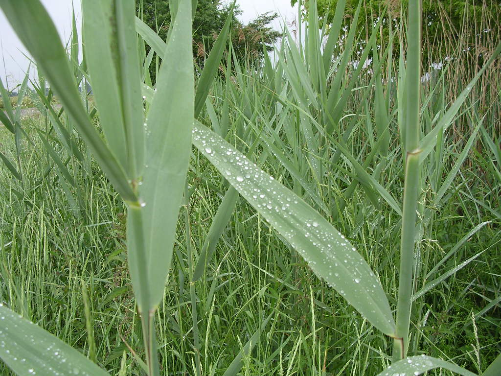 Roseau du bord de Saône